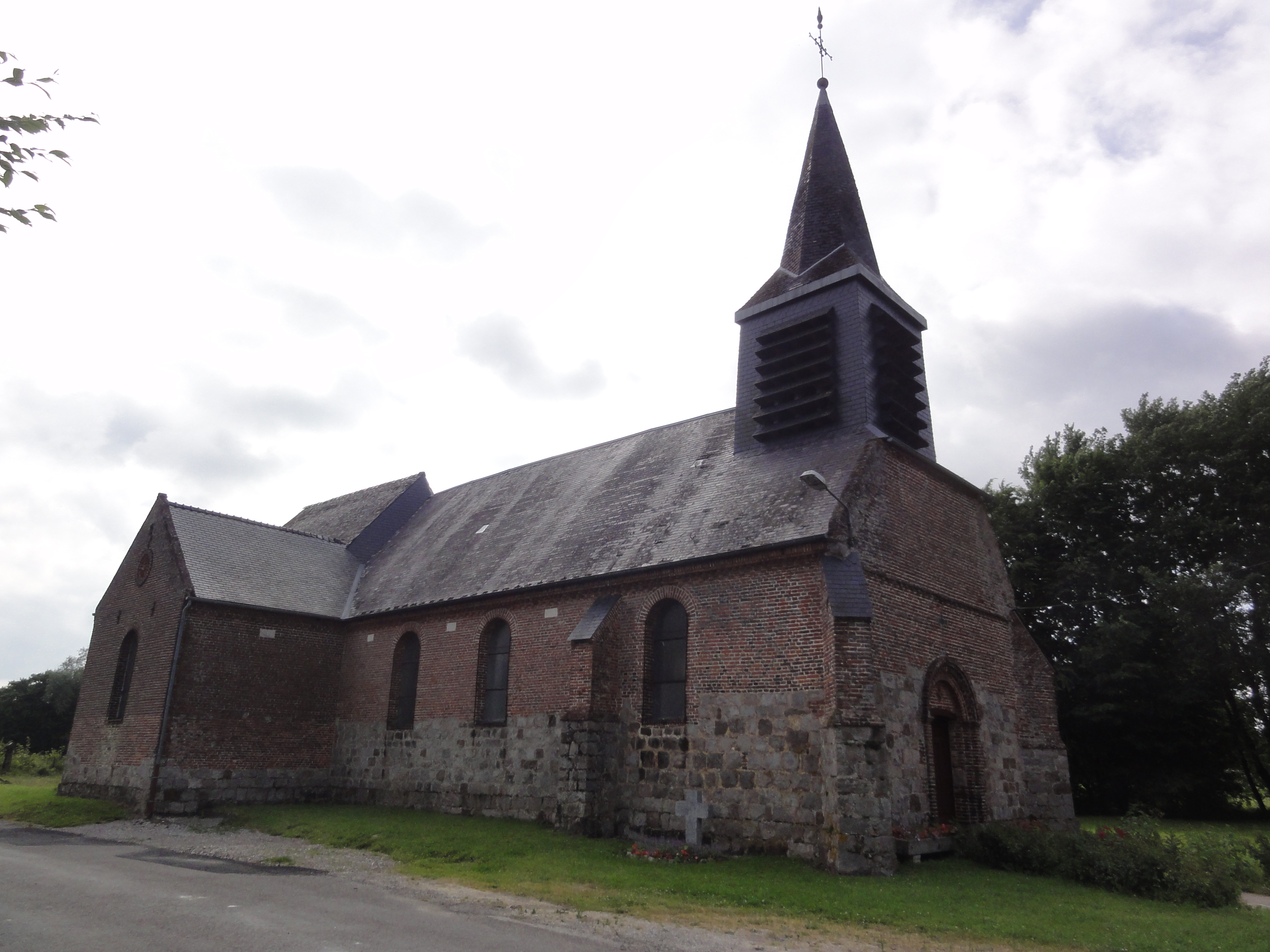 Erloy (Aisne) église Sainte-Eugénie